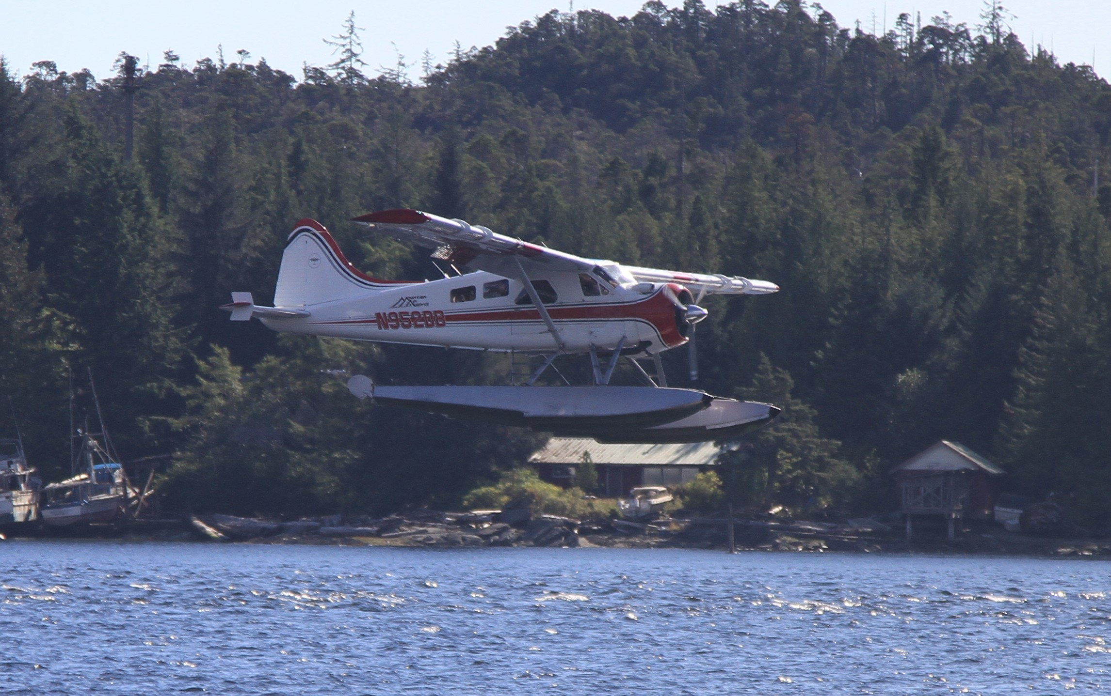 N952DB DHC-2 Beaver Ketchikan 04-09-2015